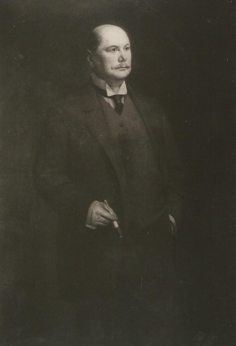 Großindustrieller u. Politiker